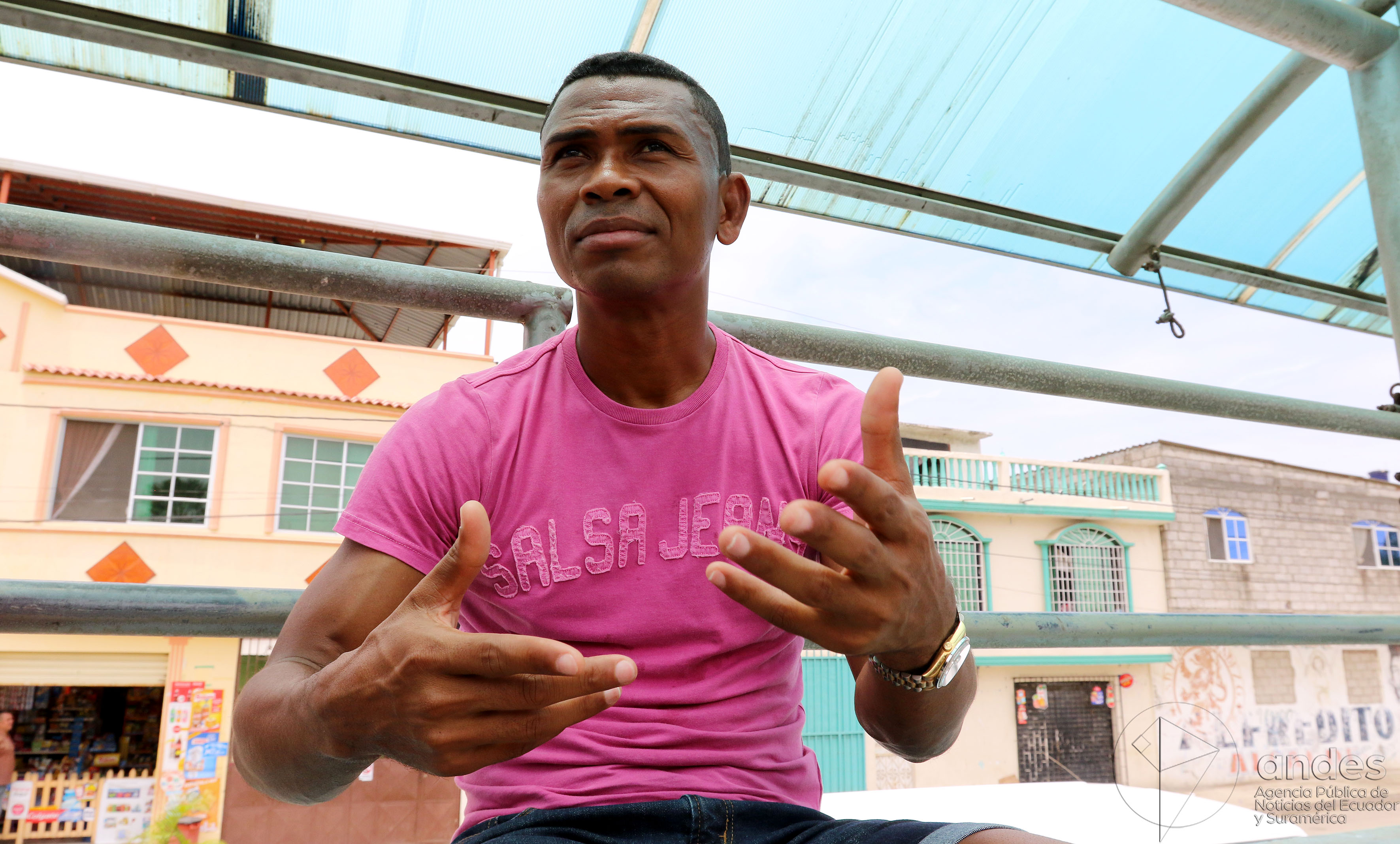 Guayaquil 18 de marzo del 2016 (Andes).-El exdefensa de la tricolor Iván "Bam Bam" Hurtado habló sobre los partido que Ecuador enfrentará contra Paraguay y Colombia por las eliminatorias. Foto:Andes/César Muñoz